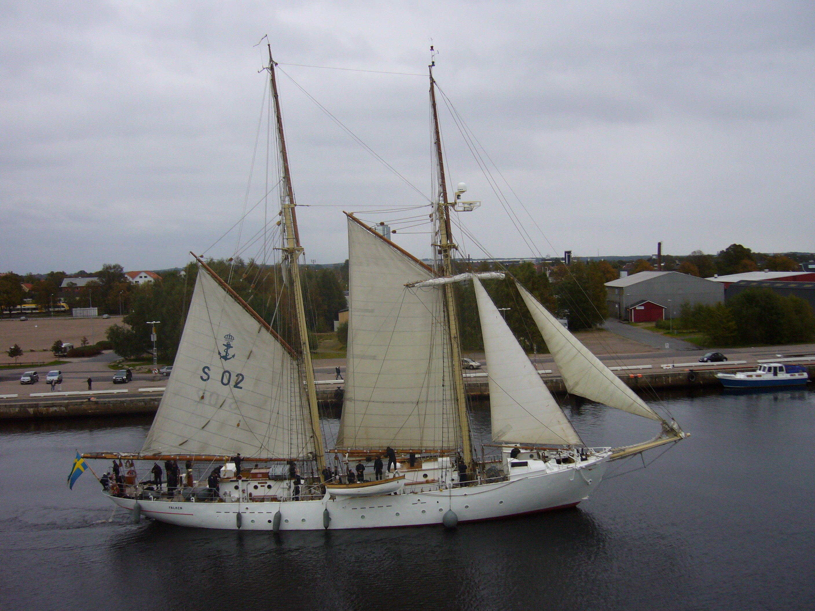 HMS Falken sailing out of Halmstad harbour